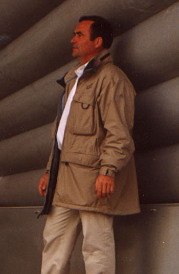 Bernard Hinault bei einer Siegerehrung der Tour de France 2004